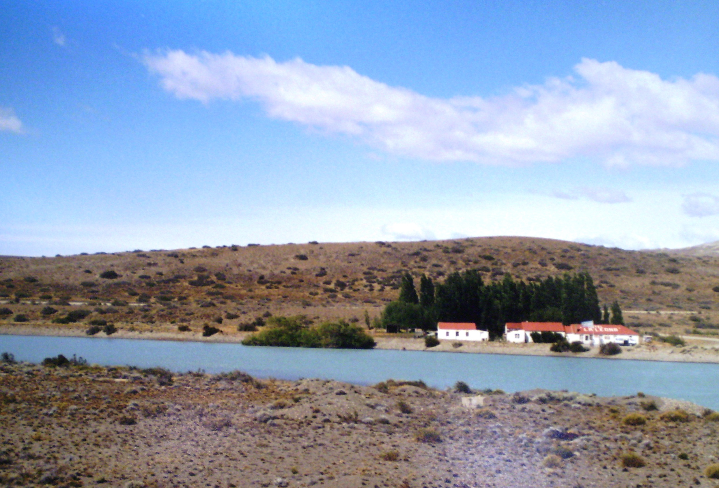 Rio y hotel La Leona, provincia de Santa Cruz, Argentina